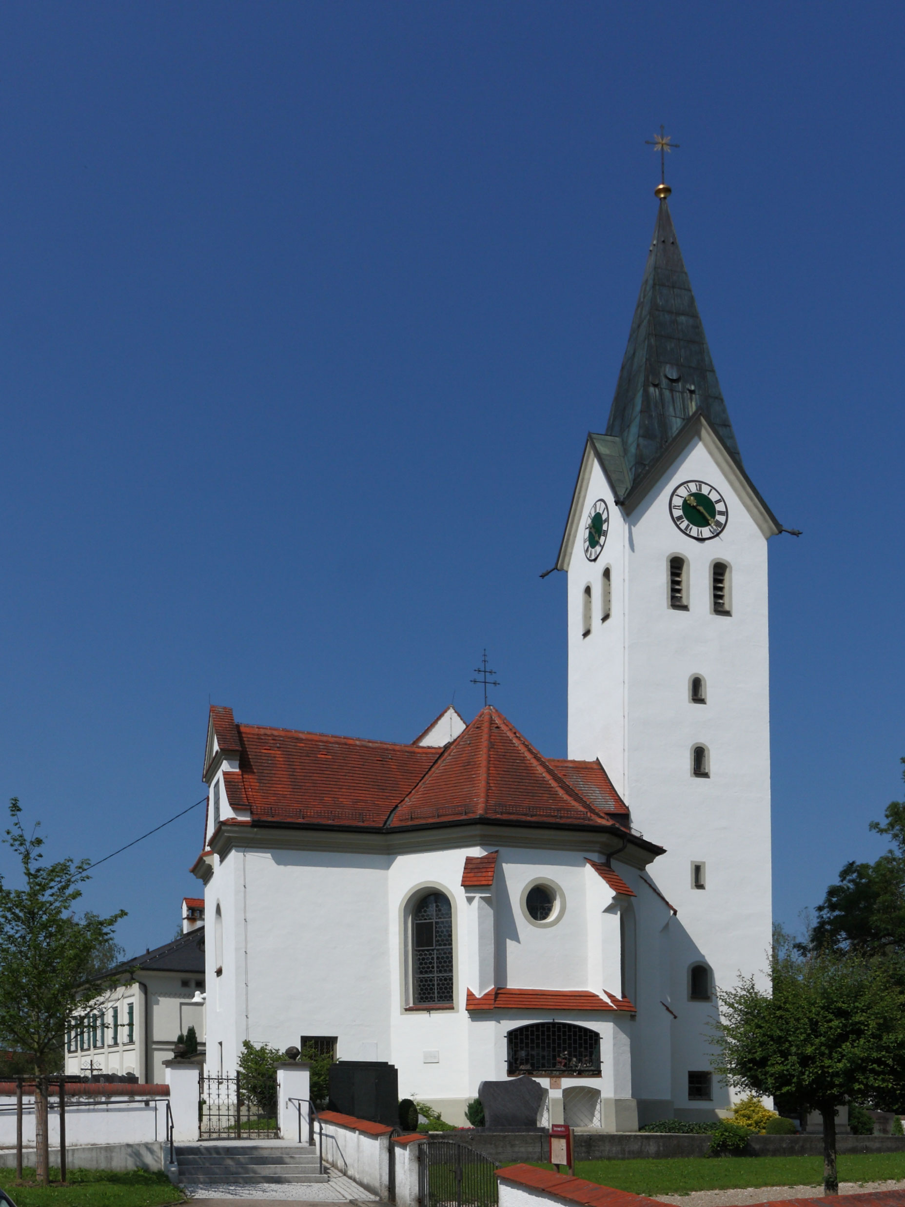 Kath. Pfarrkiche St, Ägidius in Stoffenried; Ansicht von Osten